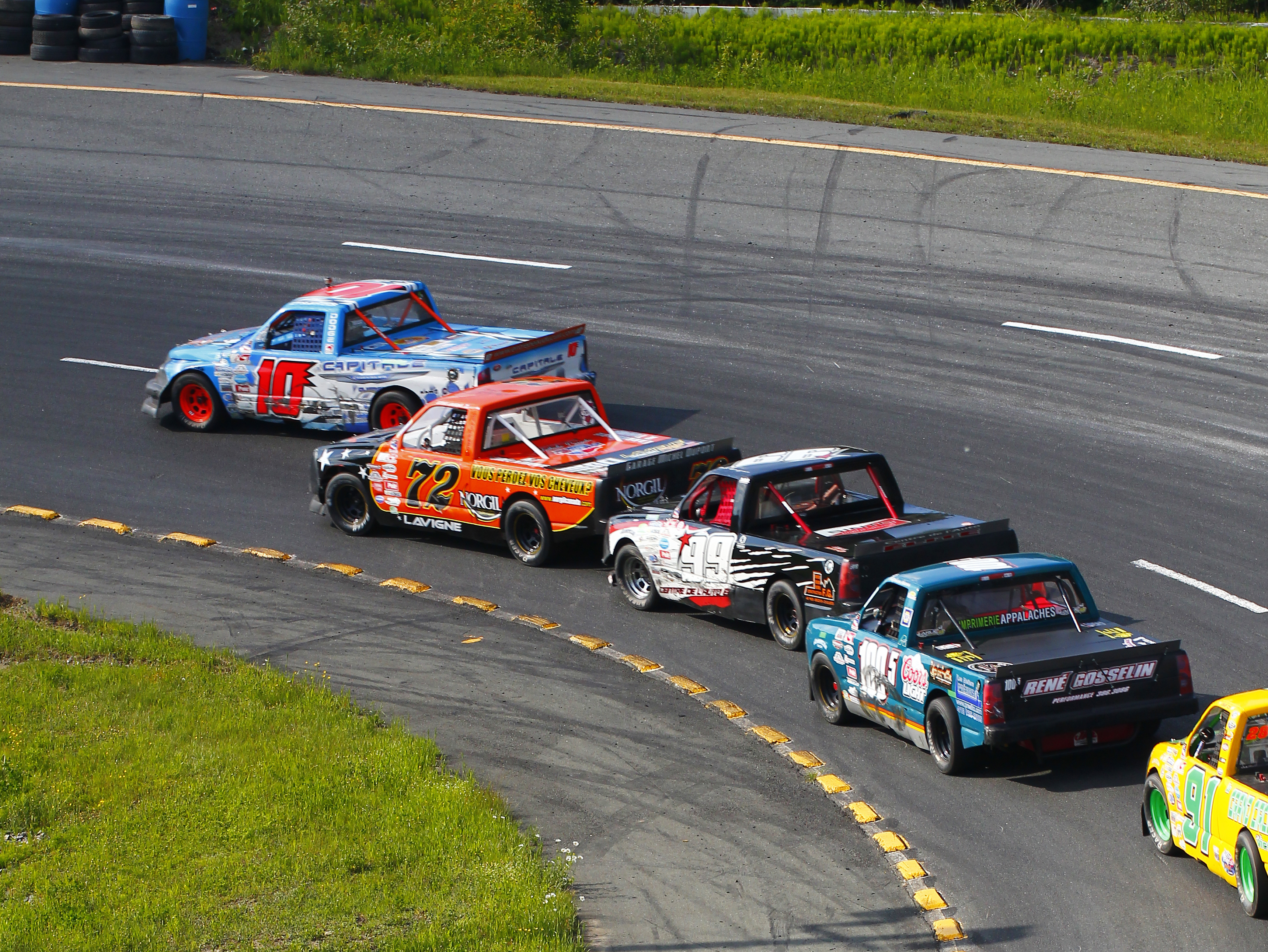 ACT Procam - Autodrome Chaudière - 13 juin 2015 (Photo Paul-Émile Poulin-Jacques)